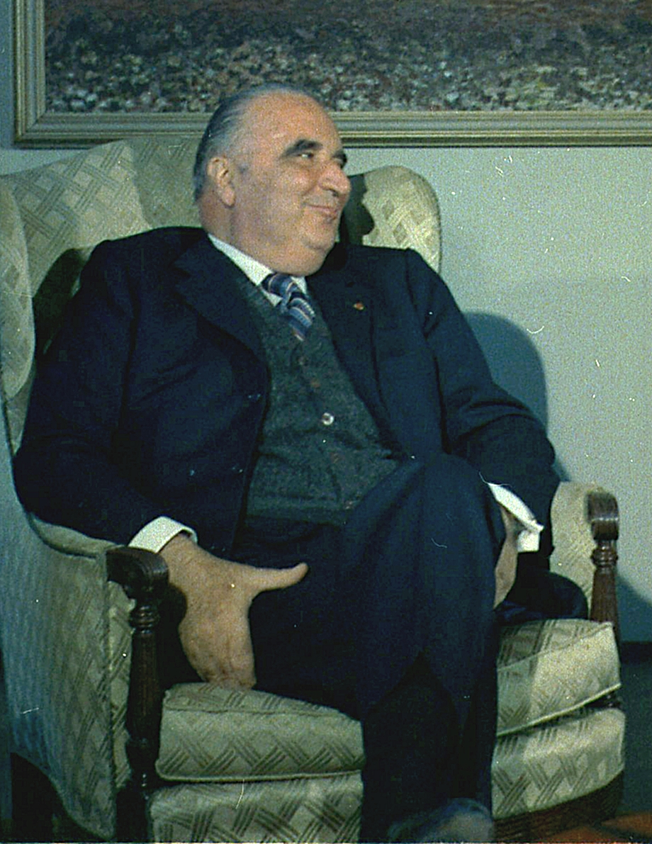 Le président français Georges Pompidou lors du sommet franco-américain de Reykjavik en 1973, où l'on constata sa surprenante prise de poids due à sa maladie.